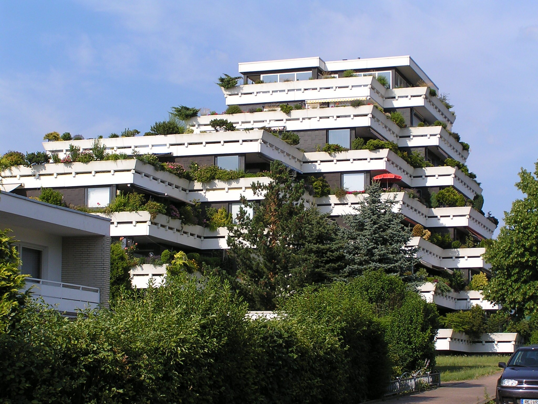 Terrace house (Terrassenhaus) in Schermbeck, Germany